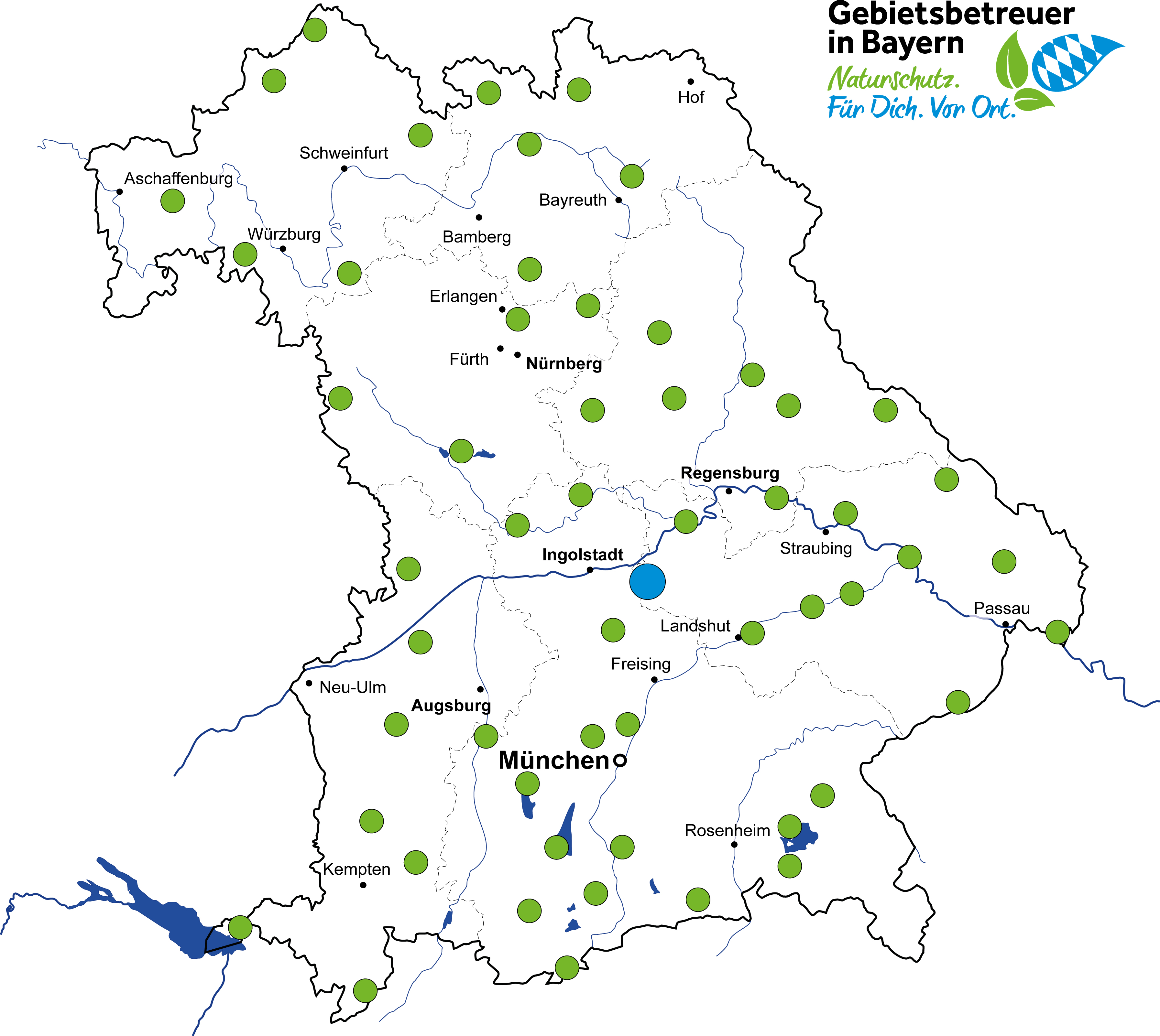 Karte des Bundeslands Bayern mit Regierungsbezirksgrenzen. Grüne Punkte stellen betreute Gebiete dar. Der blaue Punkt repräsentiert die Bayern weit aktiven, hauptamtlichen Biberberater.